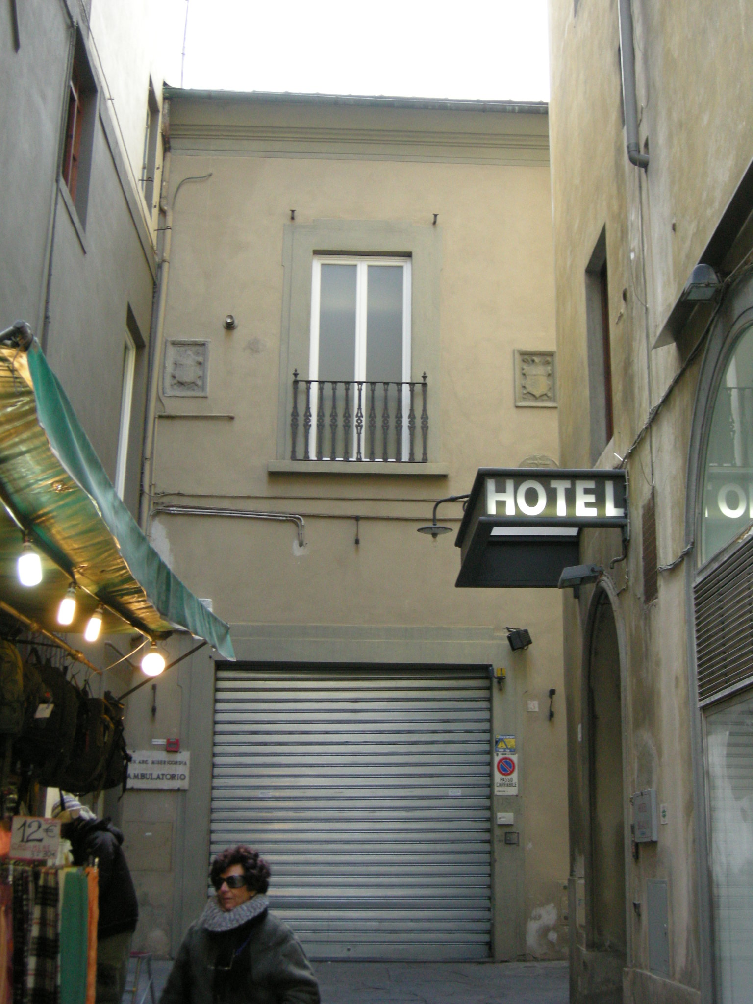 Chiesa di San Cristoforo degli Adimari